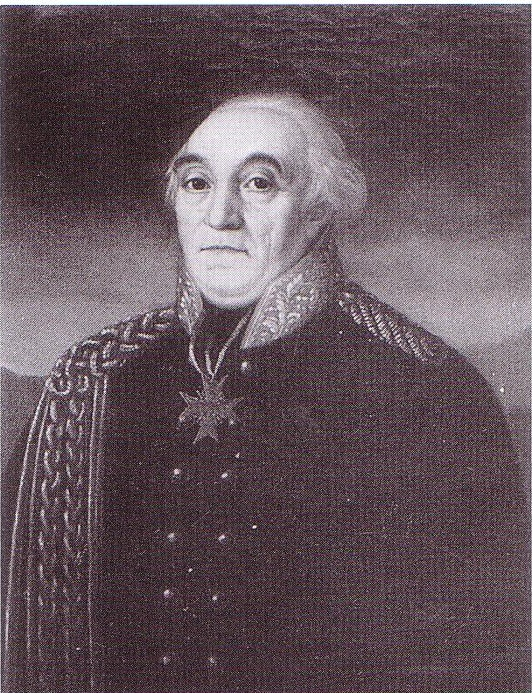 Porträt des preußischen Generals Johann Kasimir von Auer (1736-1809)